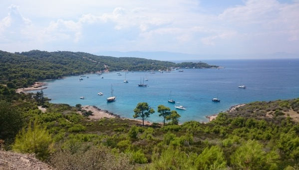 Baie de Petrokaravo Mproupoulo au nord-ouest de l'île de Spetses